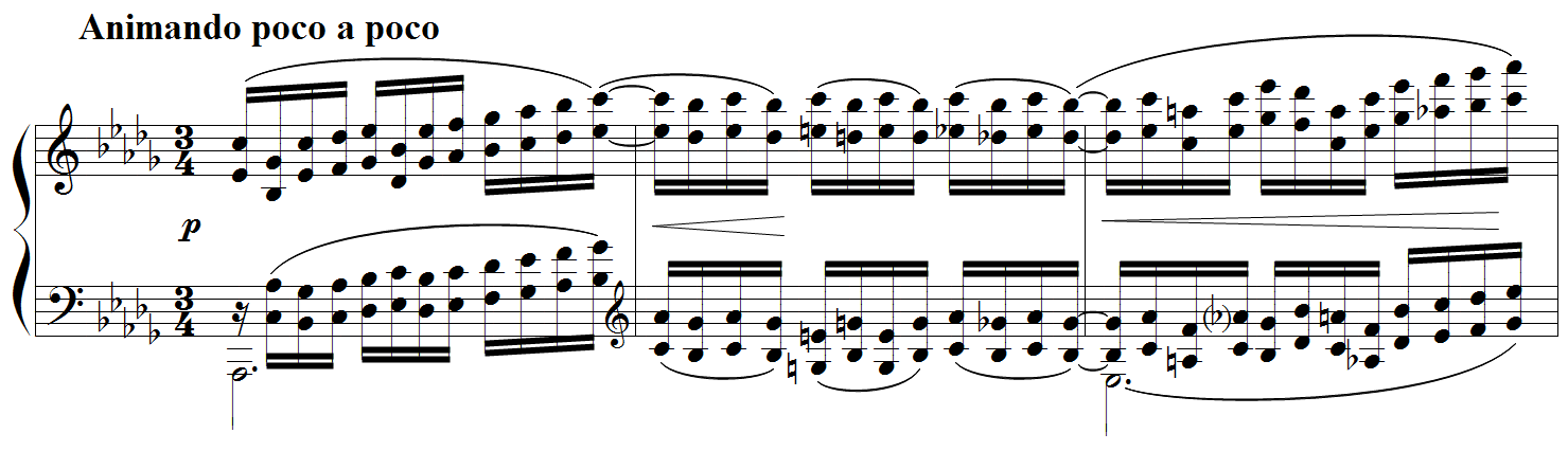 Debussy - Etude "pour les sixtes", mes.13-15